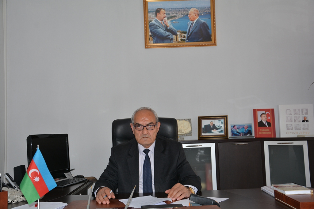 Səmədov Oqtay Əbil oğlu